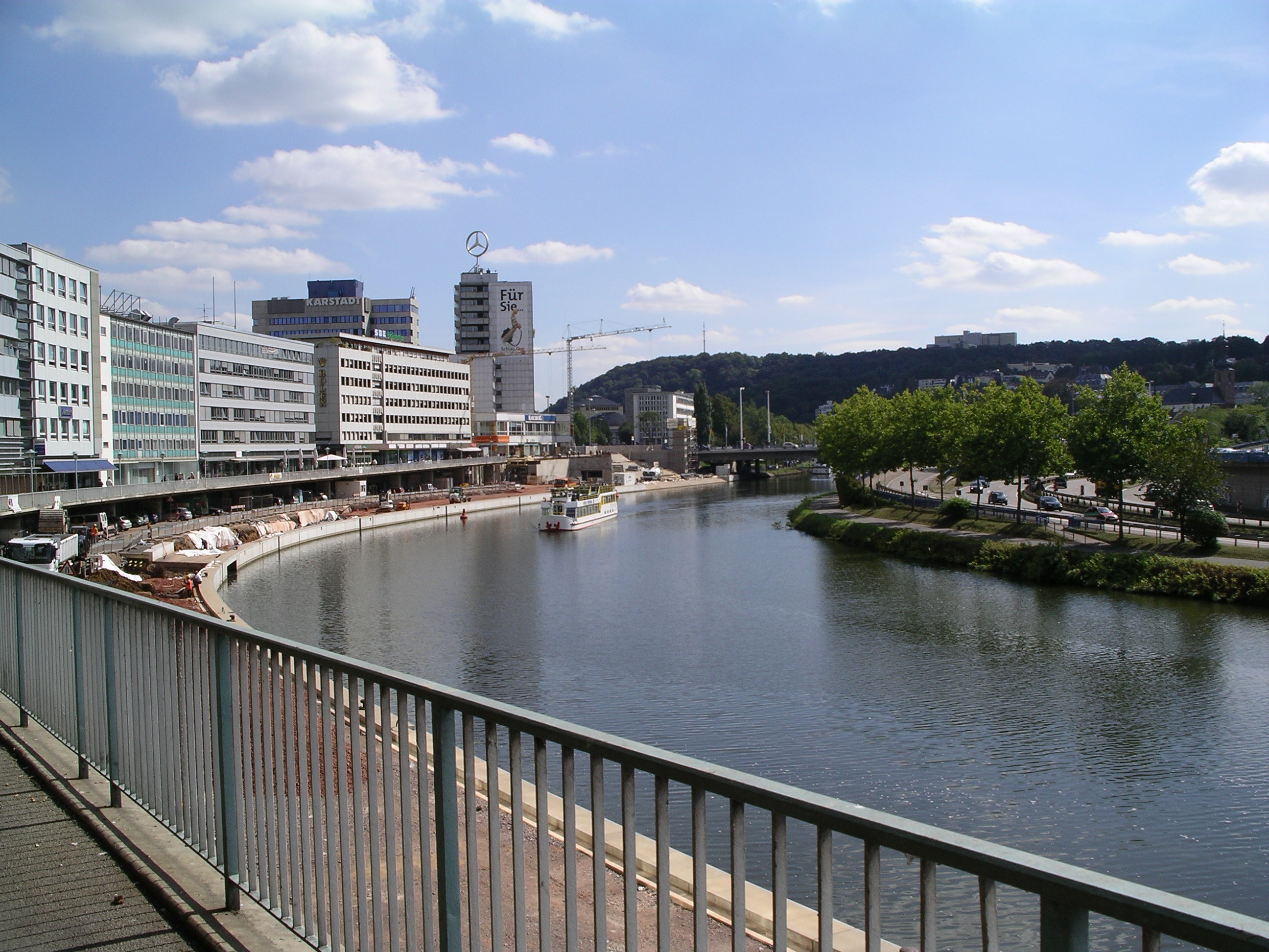 Saarbrücken. An der Saar